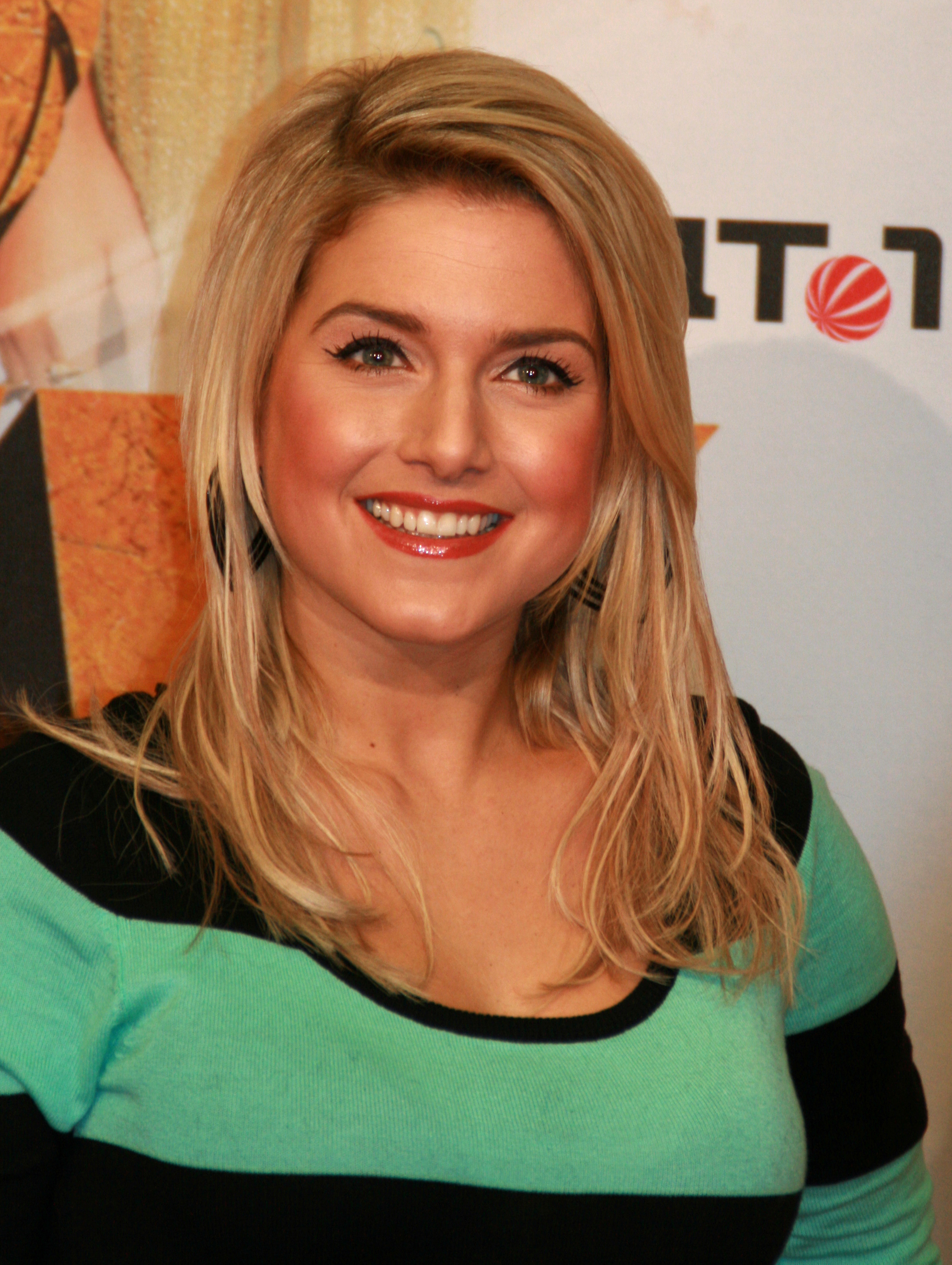 Sängerin Jeanette Biedermann am Dienstag (15.01.2008) bei der Filmpremiere von "Asterix bei den Olympischen Spielen" im MaxX Kino in München. Der Film erzählt die Geschichte von Asterix und Obelix bei den Olympischen Spielen in Griechenland.